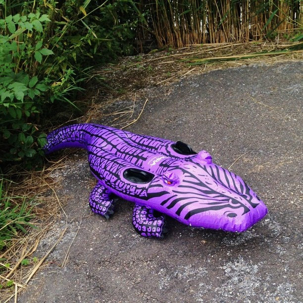 Een paarse krokodil zoals in de OHRA reclame